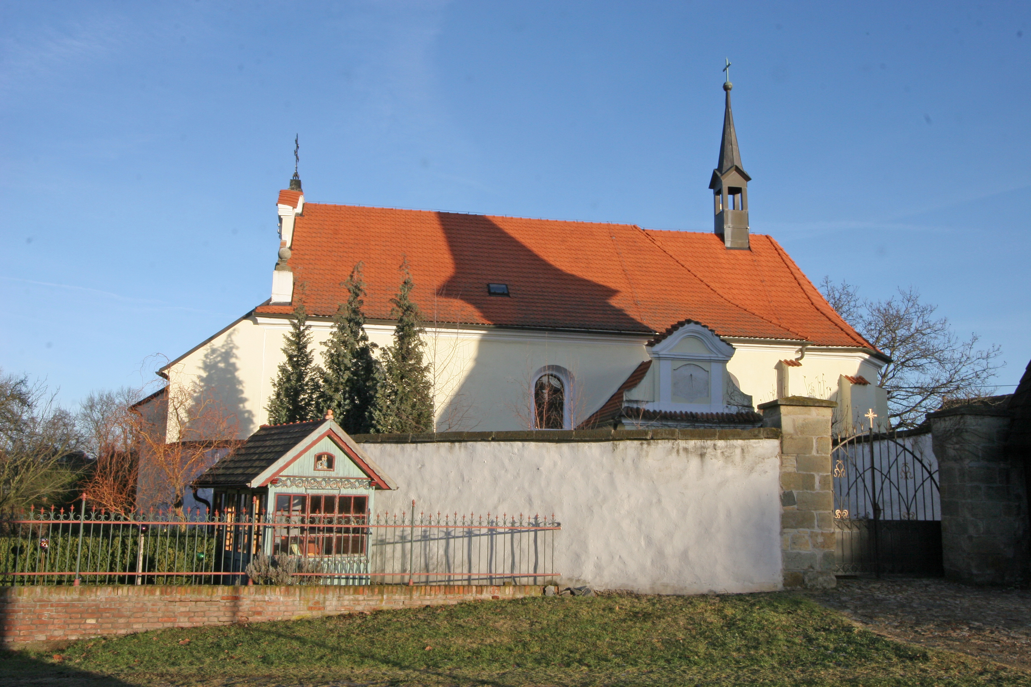 Kostel Povýšení sv. Kříže (Třebosice), Třebosice